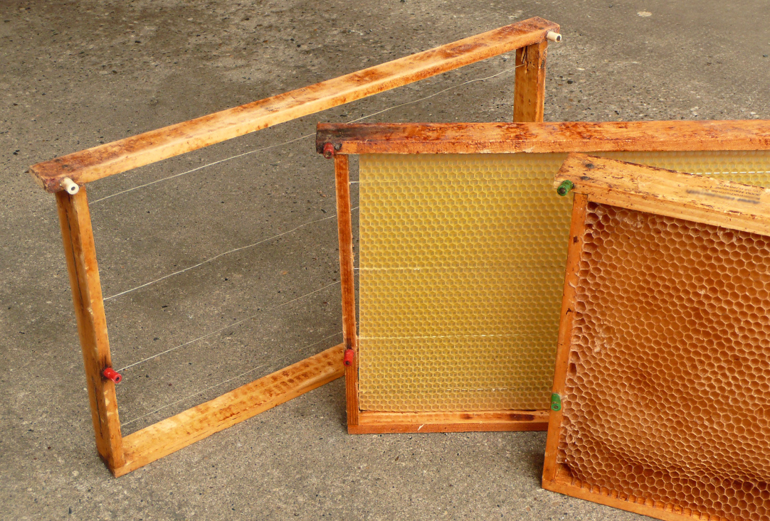 Rähmchen Mittelwand Wabe